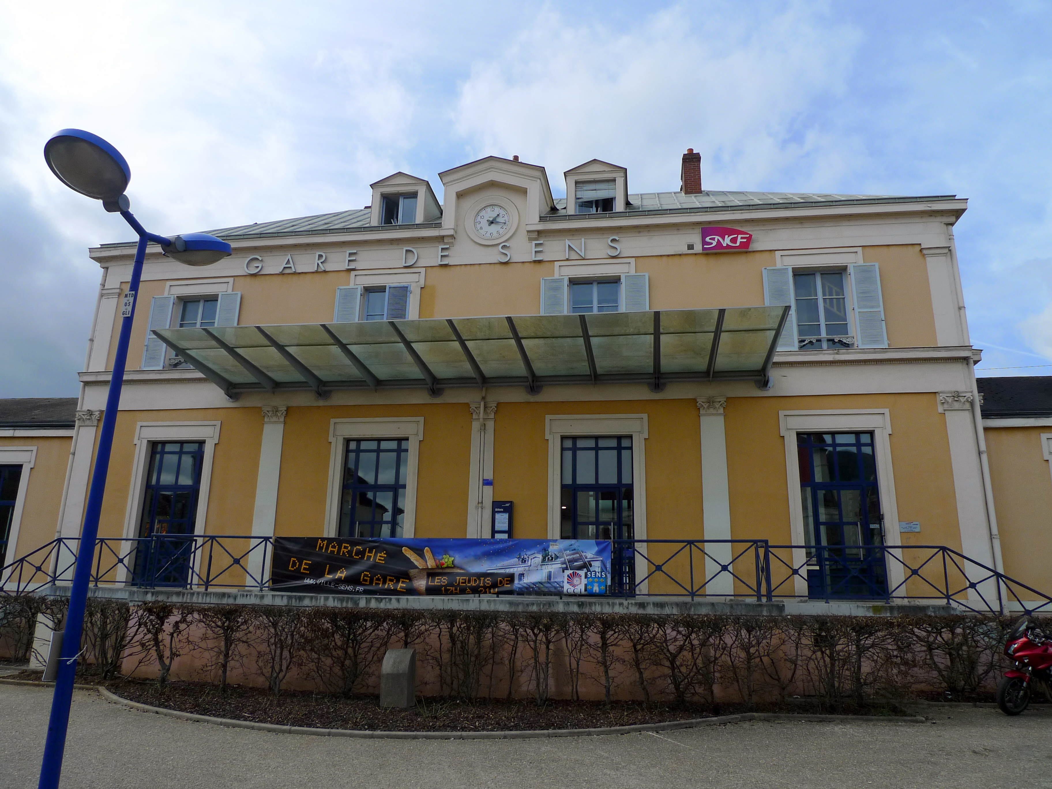 gare SNCF (SENS,FR89)